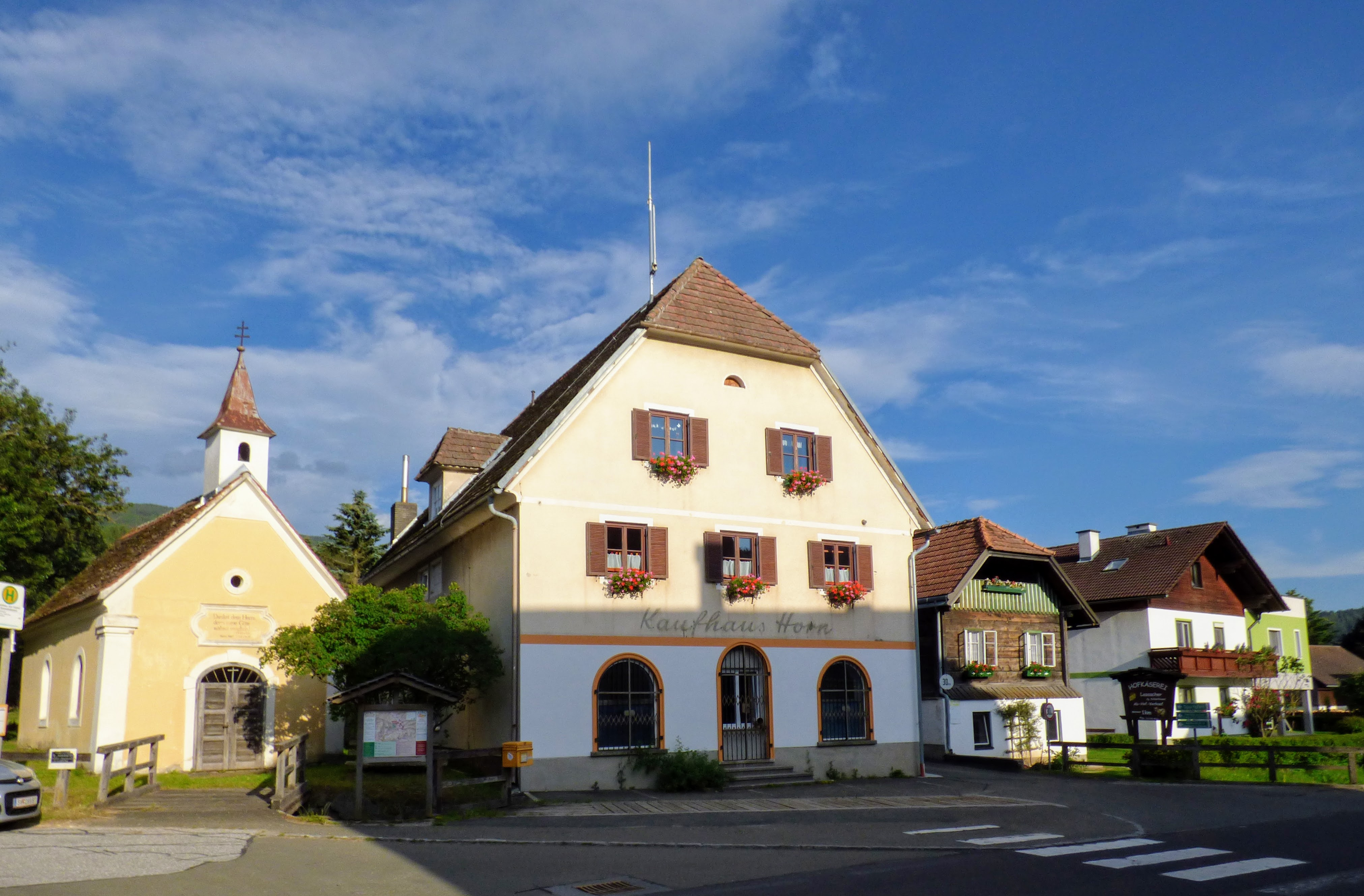 Perchau am Sattel, Häuserzeile östlich der Hauptstraße (Ansicht von Westen) Gemeinde Neumarkt in der Steiermark